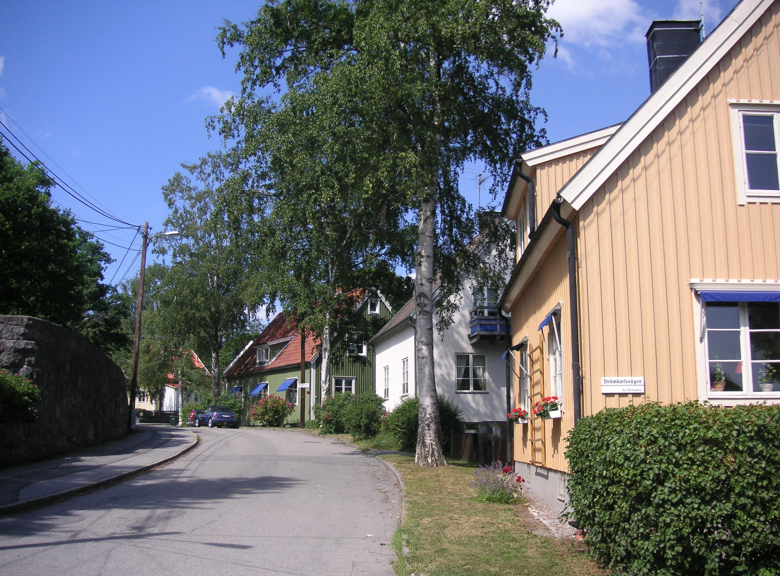 Smedslätten i Bromma/Stockholm. Bergviksvägen mot väster från korsningen vid Strömkarlsvägen mot Alviksvägen. Villor i kvarteret Silverslanten på Bergviksvägen 16 (gula huset), 18 (vita huset), 20 (gröna huset) och 22 (ljusbeiga huset).